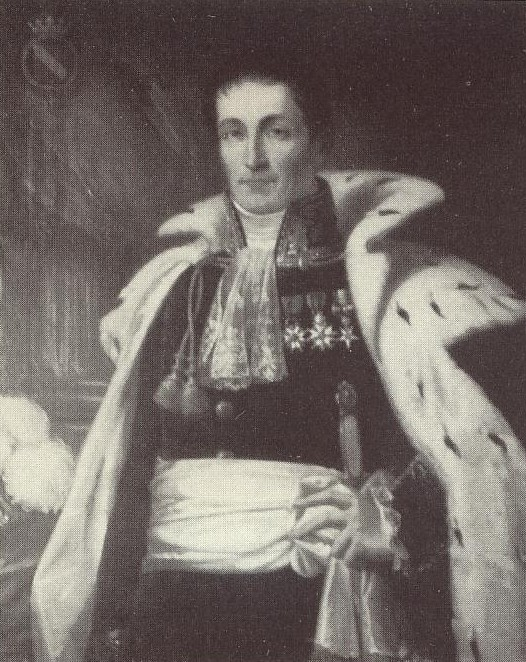 Louis de La Forest Divonne (1765-1838), pair de France